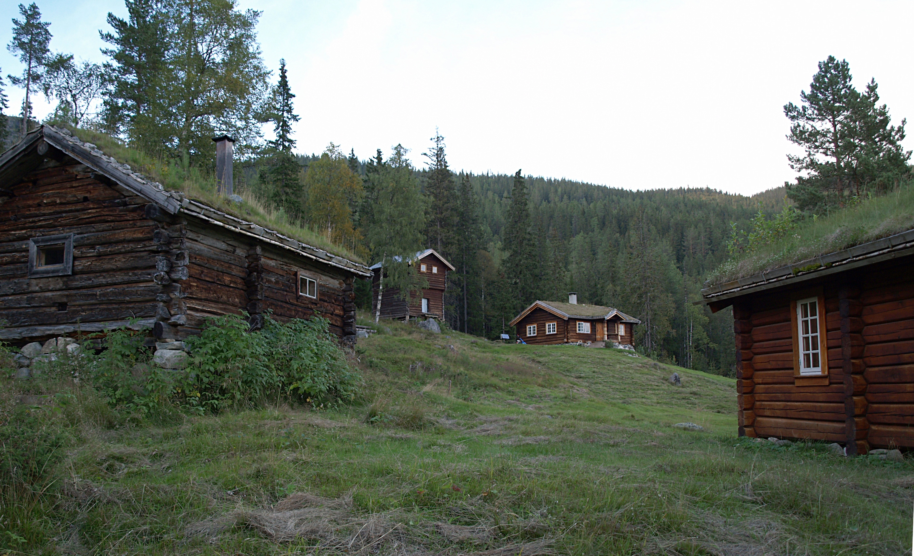 From Nevlingen in Vassfaret